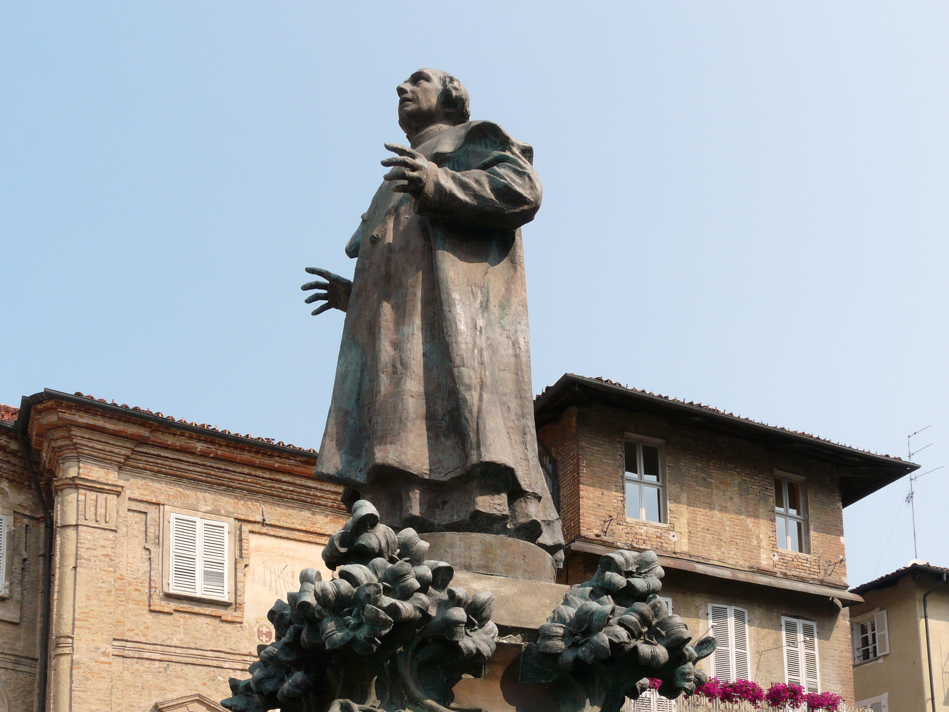 Statua a Giuseppe Benedetto Cottolengo, Bra, Piemonte, Italia